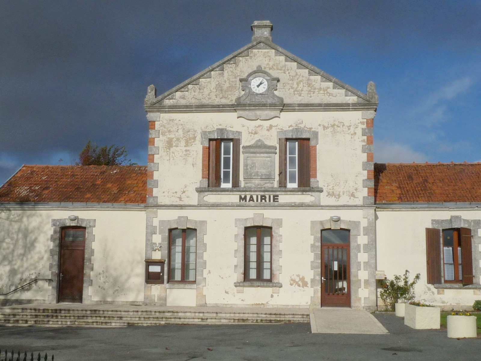 Mairie de Villegats, Charente, France